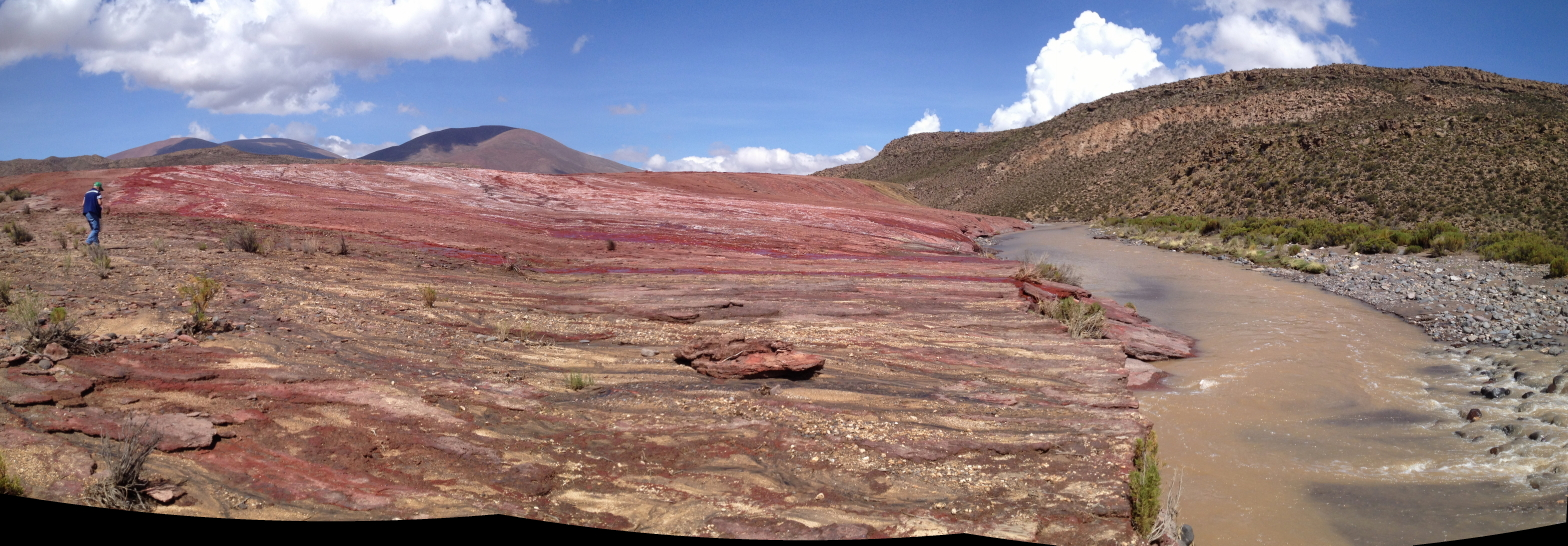 Near Embalse Caritaya, Camarones, Región de Arica y Parinacota, Chile